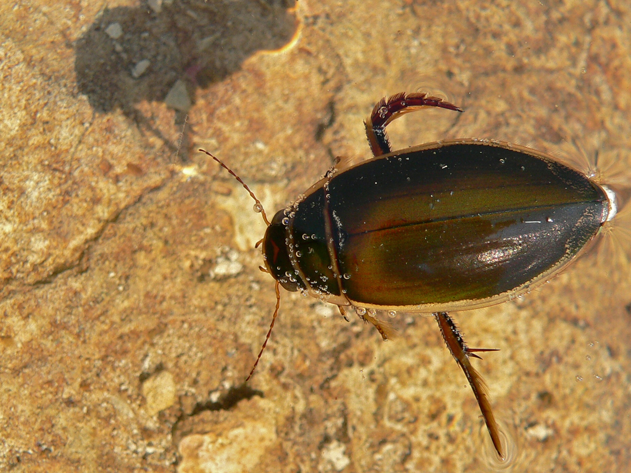 Les Rives, Hérault, FRANCE